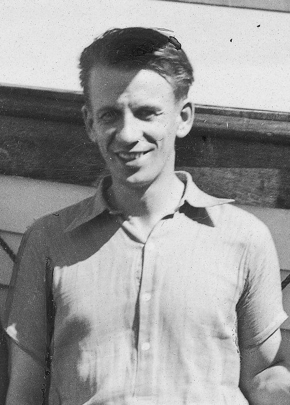 Stefan Osiecki